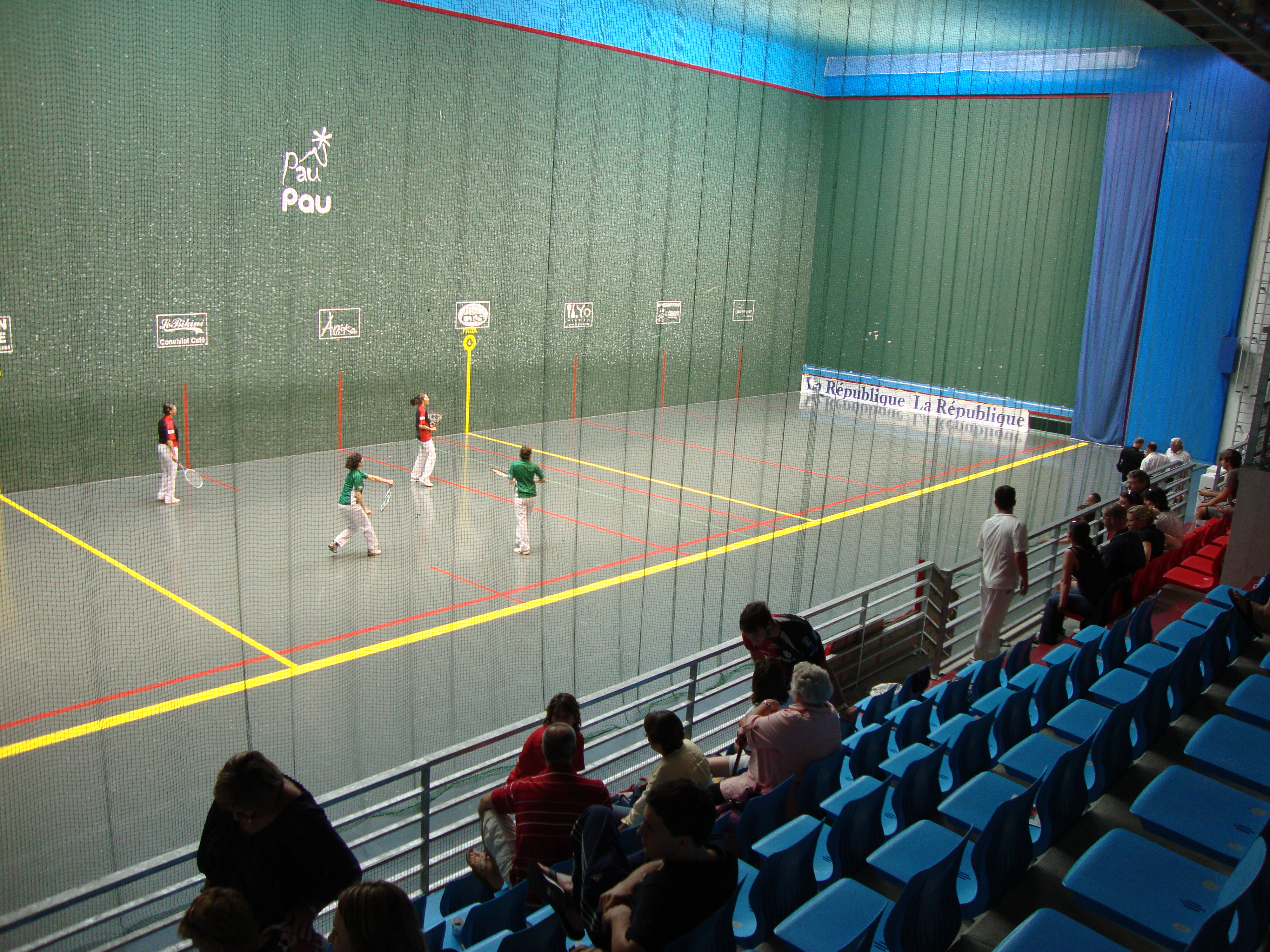 Complexe de pelote basque de Pau, frontenis, (Championnat de France 2010, Femmes B.